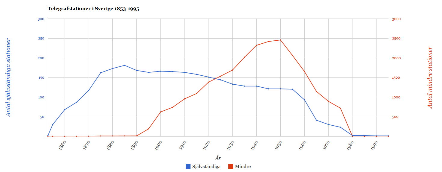 Självständiga och mindre telegrafstationer i Sverige 1853-1995. Mindre telegrafstationer är t.ex. telegramexpeditioner och telegraminlämningsställen. Terminologin har varierat genom åren. Gemensamt för dessa är att de inte behövde ha utbildad telegrafpersonal. Källor: Statistisk årsbok, div. årgångar.